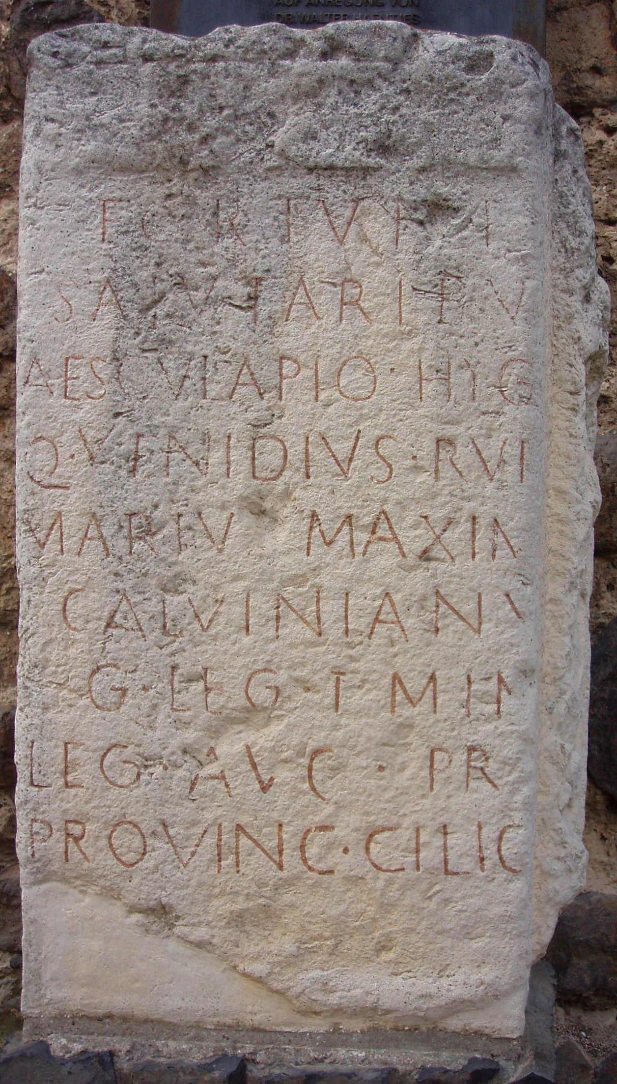 Kopie eines römischen Weihesteines zu Ehren der Heilgöttern auf der Burg Godesburg in Bad Godesberg. Der Text hat folgenden Inhalt: Fortunis / Salutaribu[s] / Aesculapio / Hyg[iae] / Q(uintus) Venidius Ruf[us] / Mariu[s] Maxim[us] / [L(ucius)] Calvinianu[s] / [le]g(atus) leg(ionis) I Min(erviae) / leg(atus) Aug(usti) pr(o) [pr(aetore)] / provinc(iae) Cilic[iae] / d(onum) [d(edit)]. Literaturhinweis: CIL 13, 07994 = Lehner 00161.